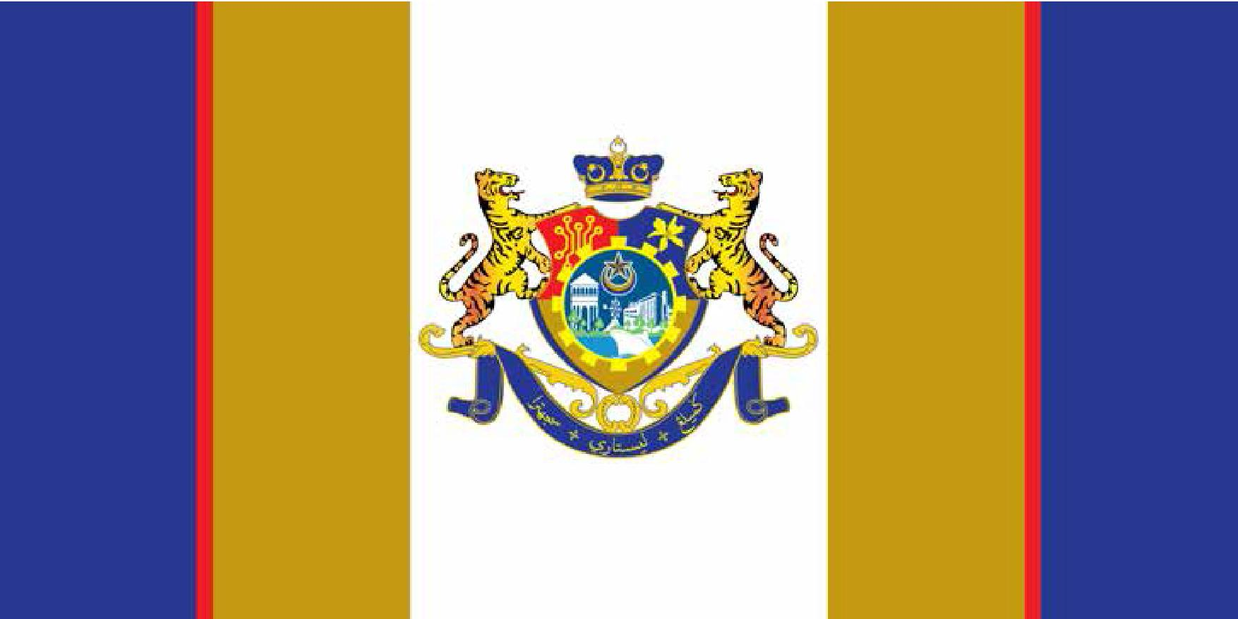 Flag of MPPG